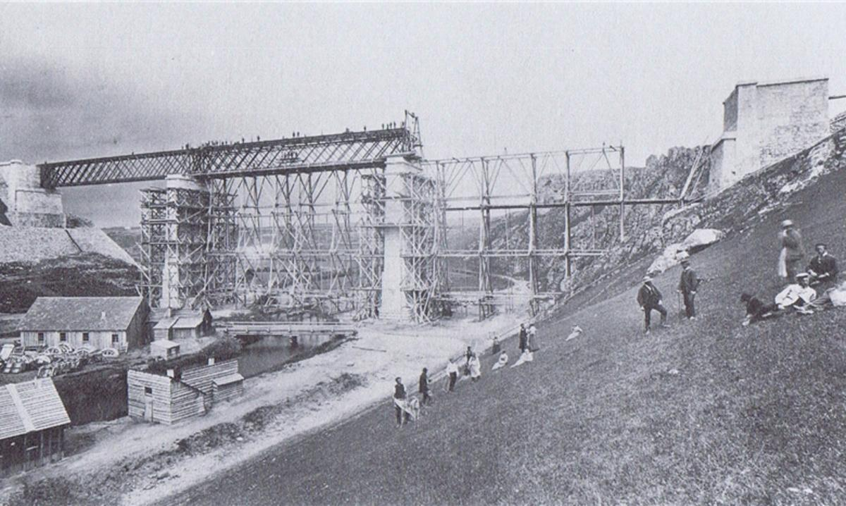 Photo - Bau der Eisenbahnbrücke bei Beratzhausen